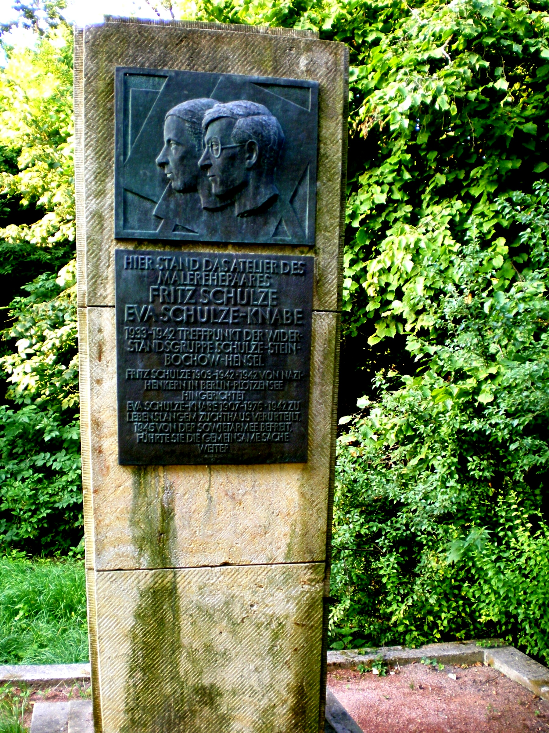 "Schulze-Knabe Gedenkstein" vom Dresdner akademischen Bildhauer Wilhelm Landgraf in Dresden Plauen am "Hohen Stein"; geschaffen 1987.